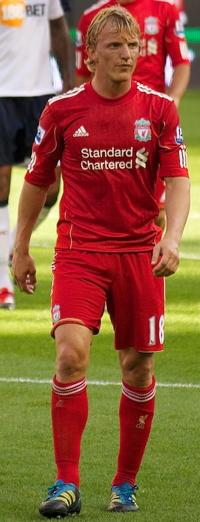 Liverpool vs Bolton 27/08/2011